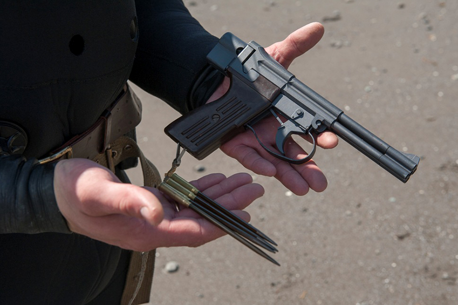 На Камчатке 311-й отряд по борьбе с подводными диверсионными силами и средствами отмечает свой профессиональный праздник.